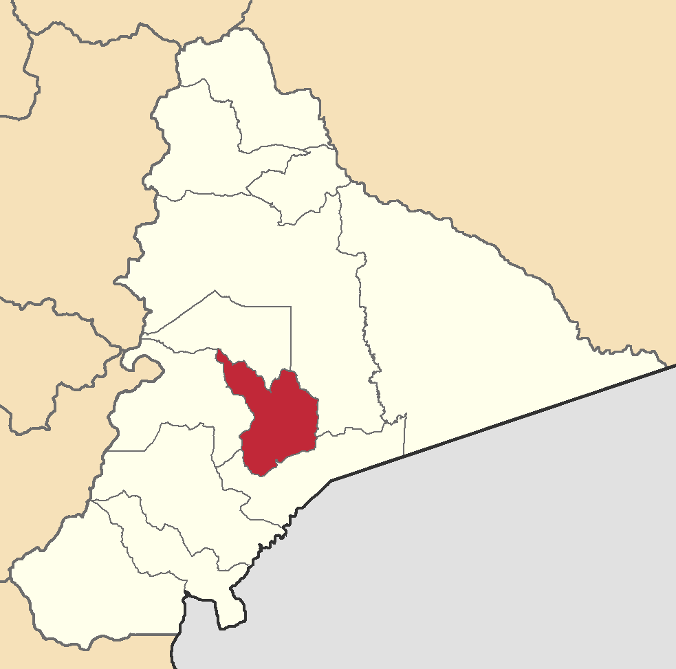 Mapa localizador del cantón en Morona-Santiago, Ecuador